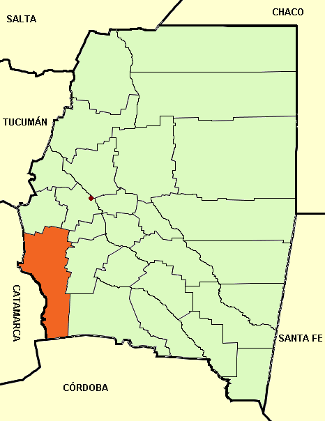 Mapa editado de: Santiago del Estero province (Argentina), departments and capital.png